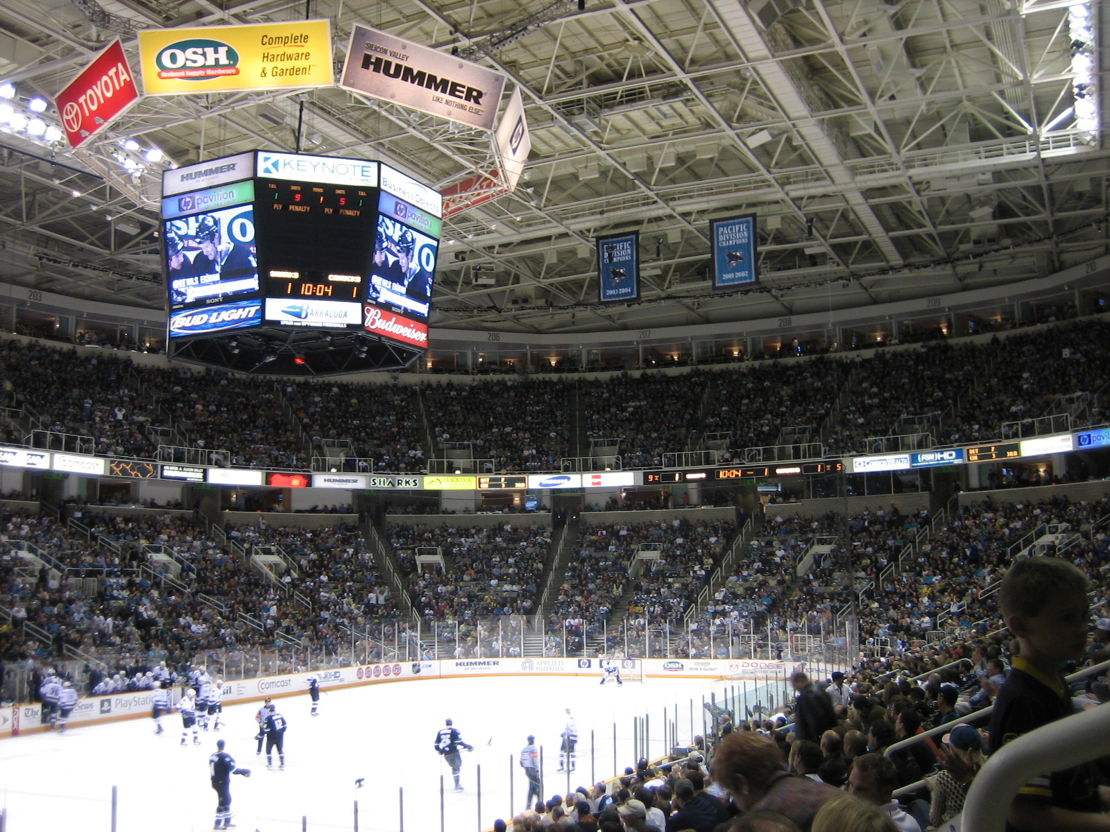 Hokejový zápas NHL - San José Sharks proti Vancouver Canucks